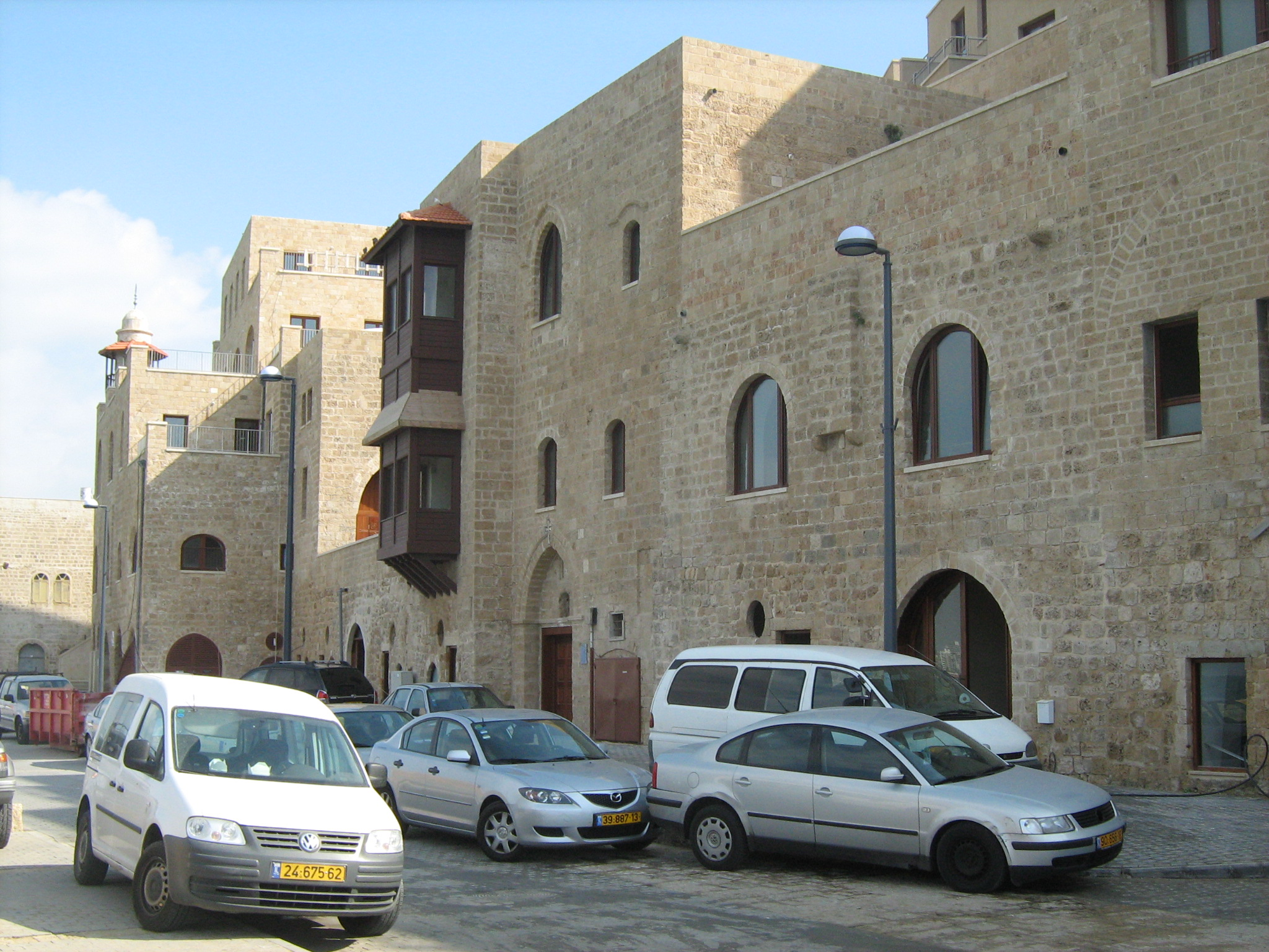 מנזר ניקולאס הקדוש ביפו